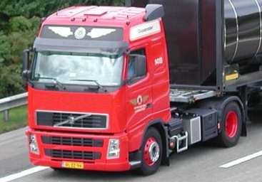 Volvo FH Truck